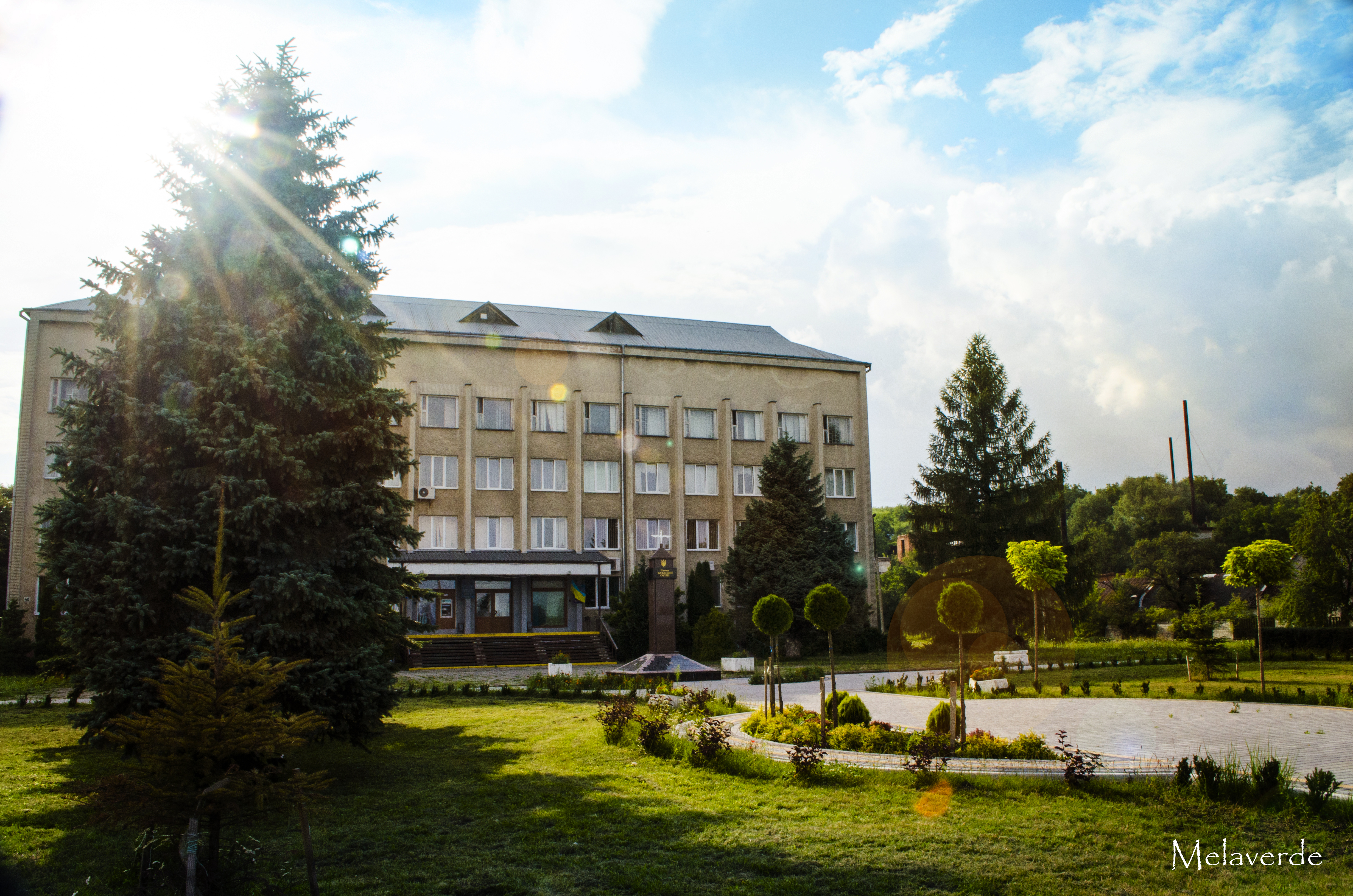 Старий Самбір, районна держадміністрація